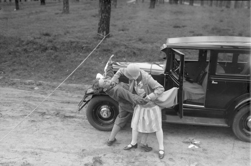 Wie schützt sich die alleinfahrende Auto-Fahrerin vor einem Ueberfall! Durch Jiu-Jitsu, einer einfachen Verteidigungsmethode ist jeder Mensch in der Lage, sich bei einem Überfall tatkräftig zu wehren und den Verbrecher sogar unschädlich zu machen. Ein Beispiel. Der Verbrecher hat ein Seil quer über die Landstrasse gespannt und das Auto zum Stehen gebracht, um die Autofahrerin zu berauben. Der Angriff des Verbrechers wird durch einen wirksamen Jiu-Jitsu-Griff an die Kehle abgewehrt.